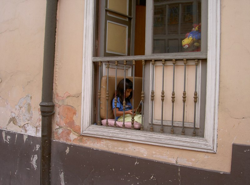 Foto tomada en Bogotá, en el Barrio La Candelaria.